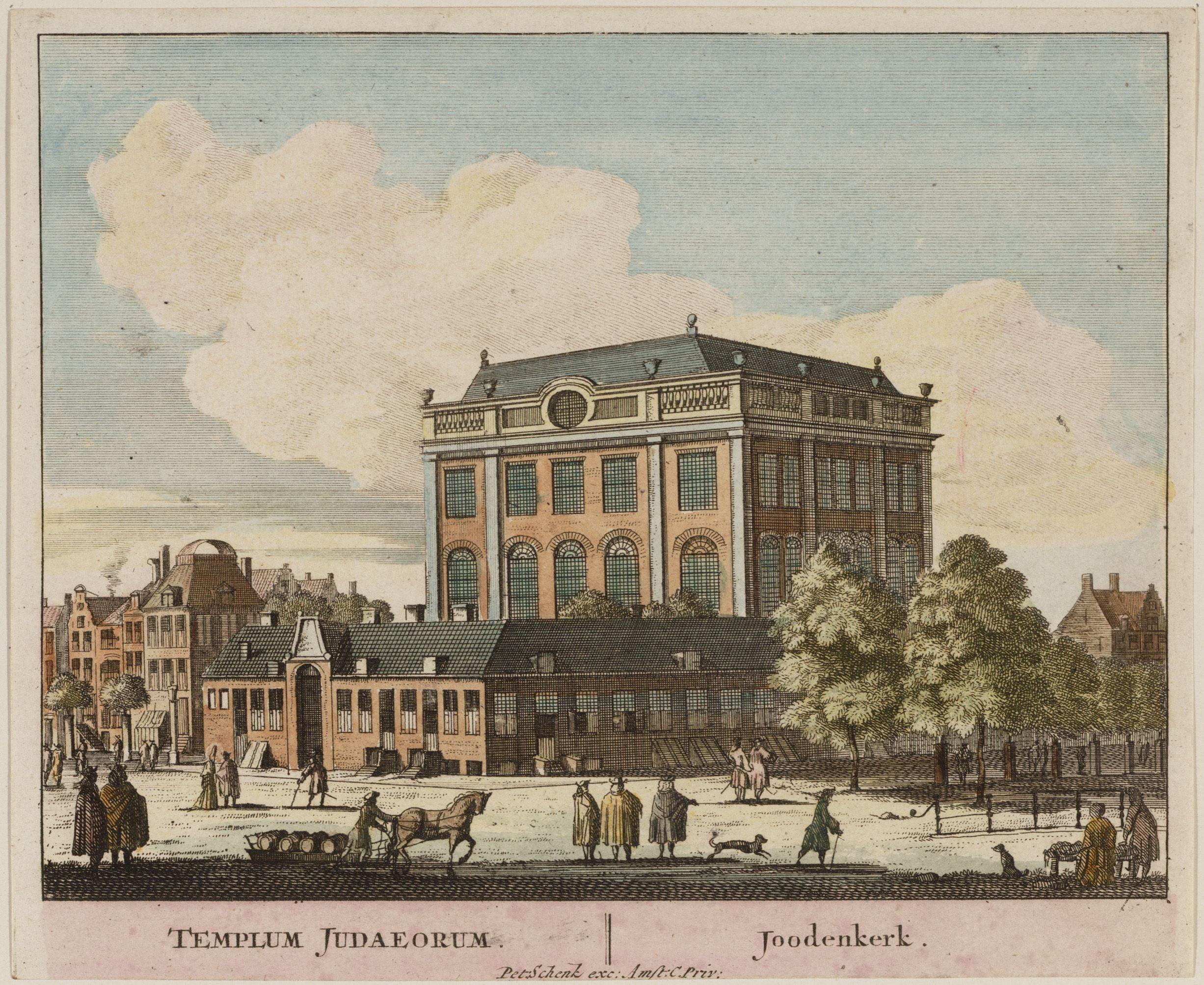 Beschrijving Templum Judaeorum / Joodenkerk De Portugees-Israëlitische Synagoge. Links Rapenburgerstraat 193-187, rechts Deventer Houtmarkt. Techniek: ets, handgekleurd. Documenttype prent Vervaardiger Schenk, Pieter (1660-1713) Collectie Collectie Atlas Dreesmann Datering 1710 ca. Geografische naam Rapenburgerstraat Mr. Visserplein Inventarissen Afbeeldingsbestand 010094005216